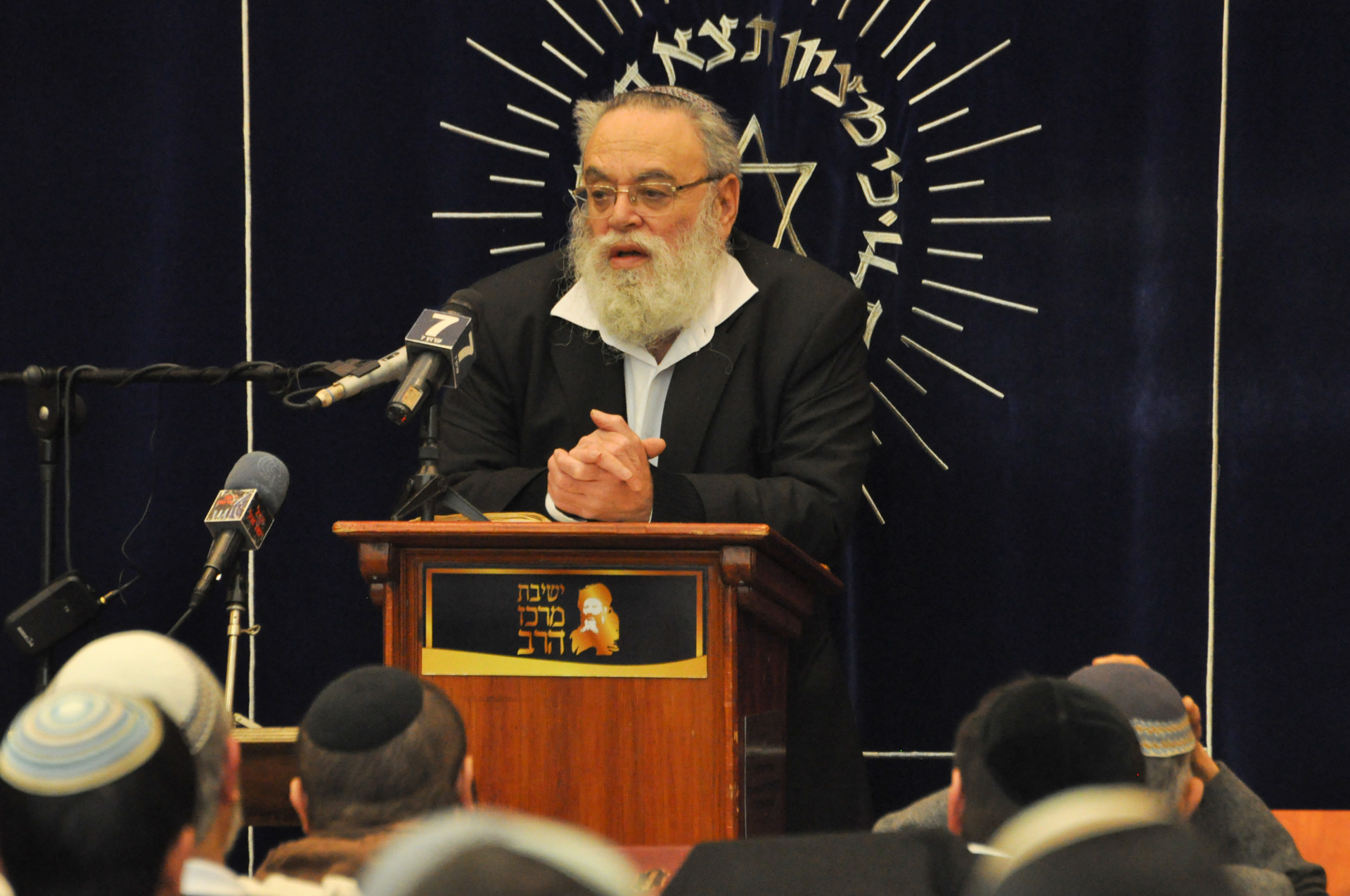 הרב ירחמיאל וייס באזכרה לנרצחים